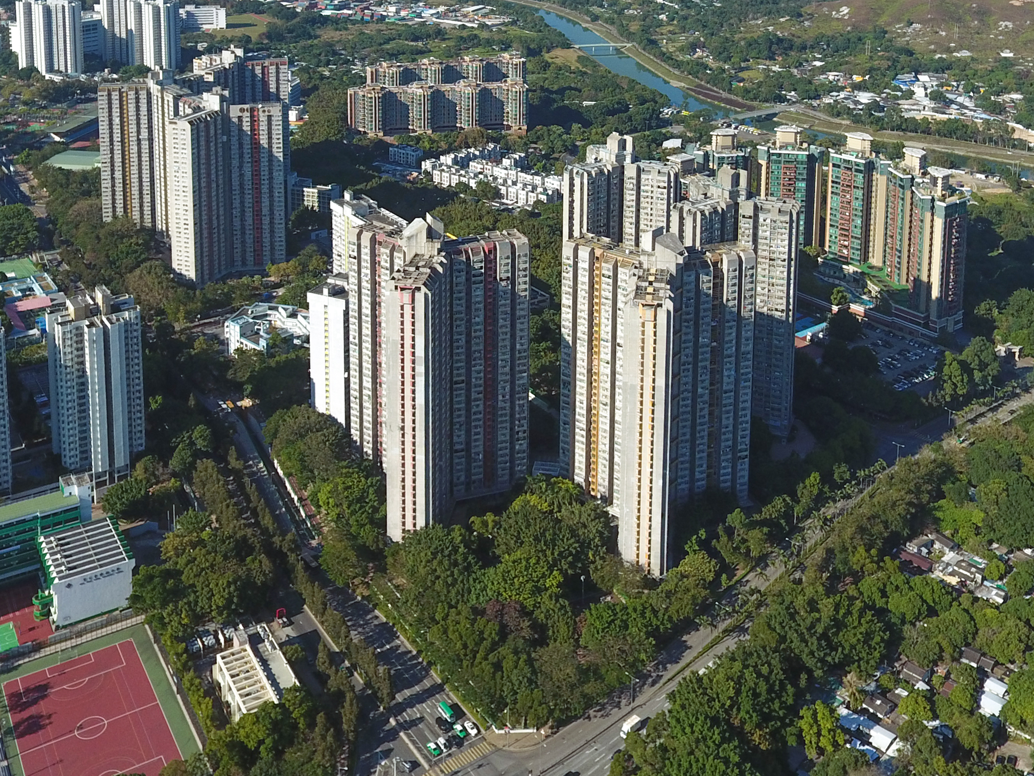 Tin Ping Estate, Sheung Shui